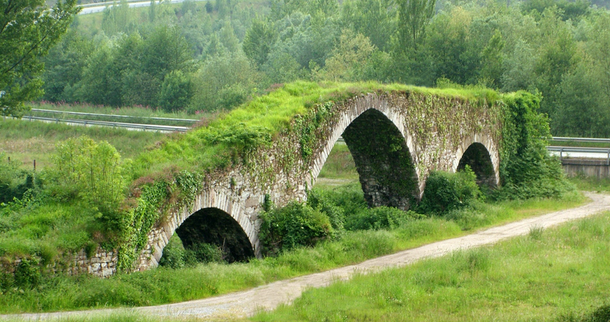 Puente medieval, situado a la entrada de Olloniego, perteneciente al concejo de Oviedo.